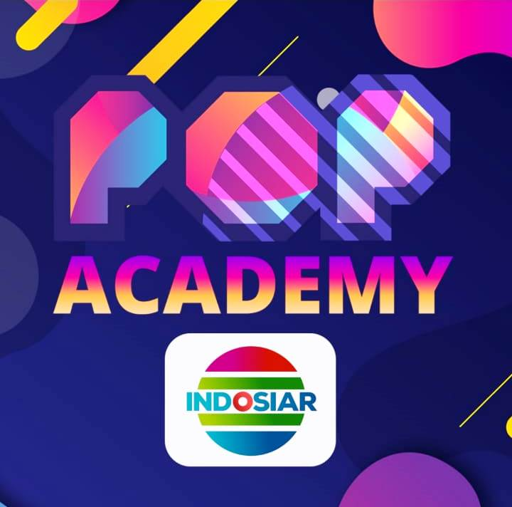 Logo Pop Academy untuk musim pertama